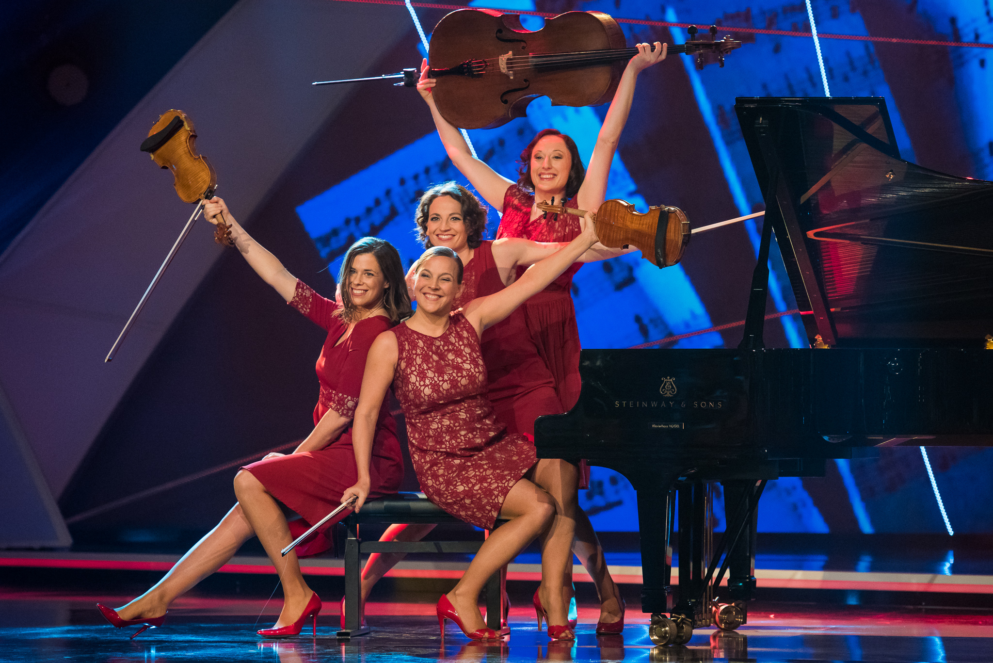 Angelika Bachmann,Anne-Monika von Twardowski,BR,Bayerisches Fernsehen,Frankenhalle,Iris Siegfried,Live-Sendung,Salut Salon,Sonja Lena Schmid,Sternstunden-Gala